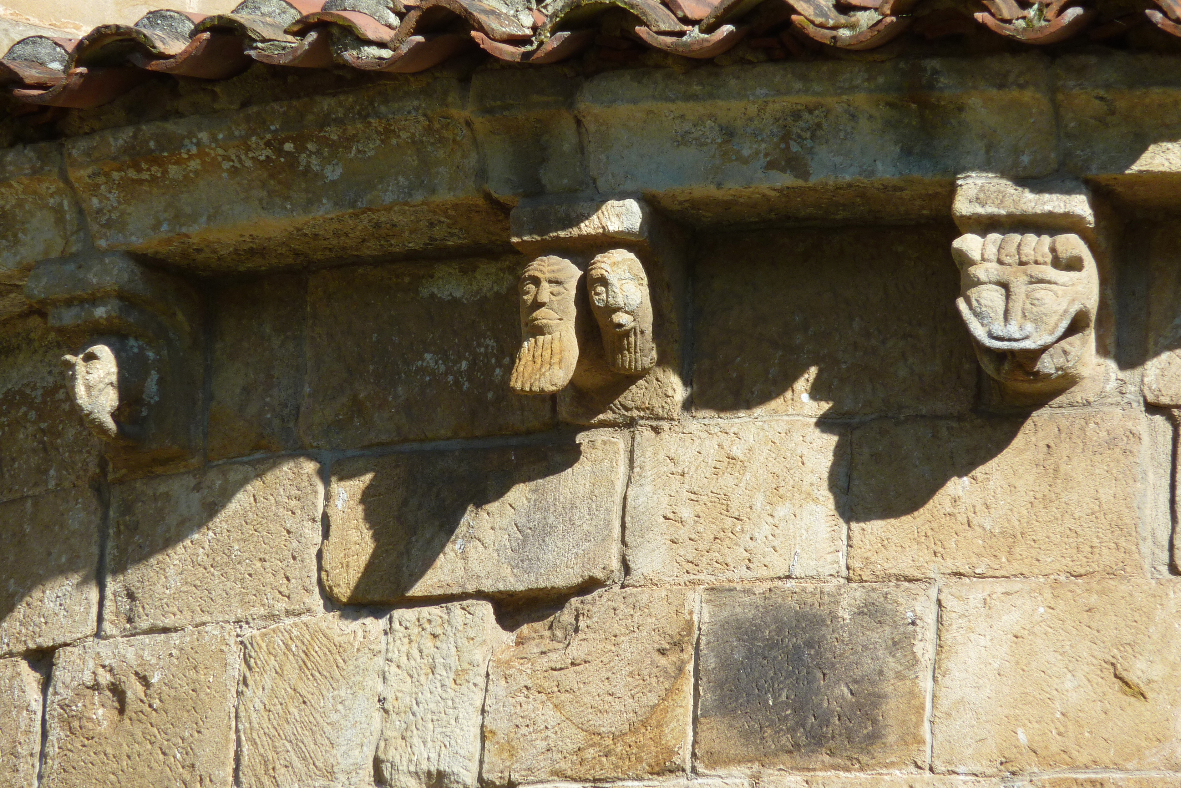 Ehemalige Benediktinerklosterkirche Colegiata de Santa Cruz in Castañeda in Kantabrien (Spanien), Kragsteine